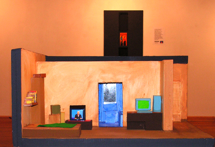 Kawalerka, "Miejsce Zamieszkania" - Galeria Bałtycka w Ustce 2005r